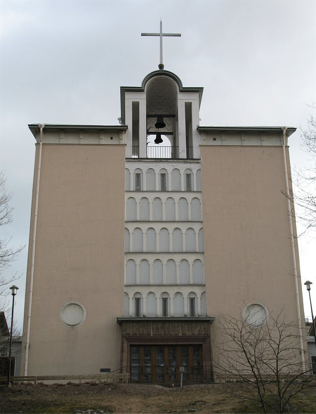 Töölö Church, photo 2, situated in the Taka-Töölö district of Helsinki, Finland. (In Finnish: Töölön kirkko Helsingin Taka-Töölössä)